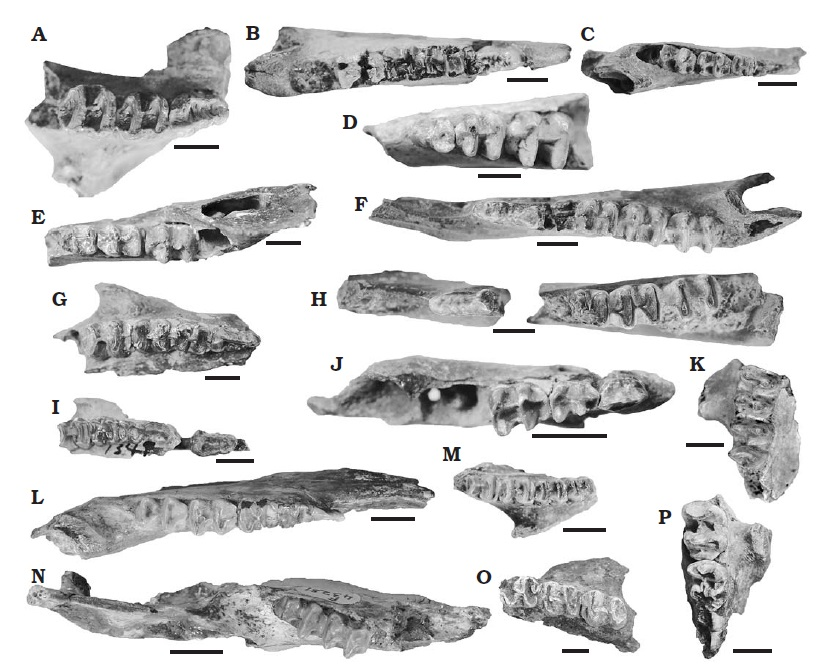 Macropodids from Chinchilla Sand, Australia, Pliocene. A. Simosthenurus antiquus (Bartholomai, 1963), QM F2975, partial left maxilla of probable Chinchilla provenance. B. Sthenurus andersoni Marcus, 1962, QM F814, unspecified locality near Chinchilla, left juvenile dentary. C. Macropus agilis siva (de Vis, 1895), QM F4733, unspecified locality near Chinchilla, right mandibular fragment. D. Sthenurus notabilis Bartholomai, 1963, QM F3817, Chinchilla Rifle Range, right mandibular ramus. E. Troposodon gurar Flannery and Archer, 1983, QM F4609, unspecified locality near Chinchilla, right dentary of probable Chinchilla provenance. F. Protemnodon devisi Bartholomai, 1973, QM F4710, unspecified locality near Chinchilla, partial left mandibular ramus. G. Macropus dryas de Vis, 1895, QM F3582, partial right maxilla of probable Chinchilla provenance. H. Protemnodon chinchillaensis Bartholomai, 1973, QM F5246, unspecified locality near Chinchilla, partial right mandibular ramus. I. Bohra wilkinsonorum Dawson, 2004, QM F43277, Chinchilla Rifle Range, right maxillary fragment. J. Wallabia indra (de Vis, 1895), QM F3595, unspecified locality near Chinchilla, left mandibular ramus. K. Troposodon minor (Owen, 1877), QM F4389, Condamine River, “50 yards east of Chinchilla Rifle Range”, right maxillary fragment. L. Prionotemnus palankarinnicus Stirton, 1955, QM F3589, partial right mandibular ramus of probable Chinchilla provenance. M. Silvaroo bila Dawson, 2004, QM F43276, Chinchilla Rifle Range, left maxillary fragment. N. Silvaroo sp., QM F43281, Chinchilla Rifle Range, right mandibular ramus. O. Macropus woodsi Bartholomai, 1975, QM F5465, Chinchilla Rifle Range, partial left maxilla. P. Macropus pan de Vis, 1895, QM F2925, partial right maxilla of probable Chinchilla provenance. Scale bars 10 mm.